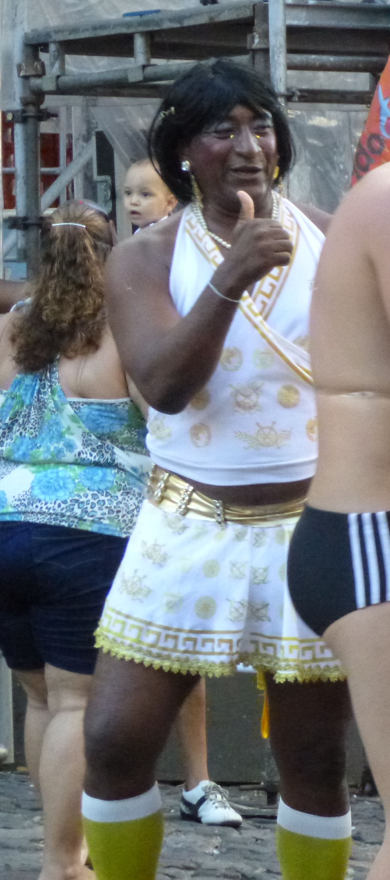 Alexius Muquinana am Pelourinho Salvador Bahia